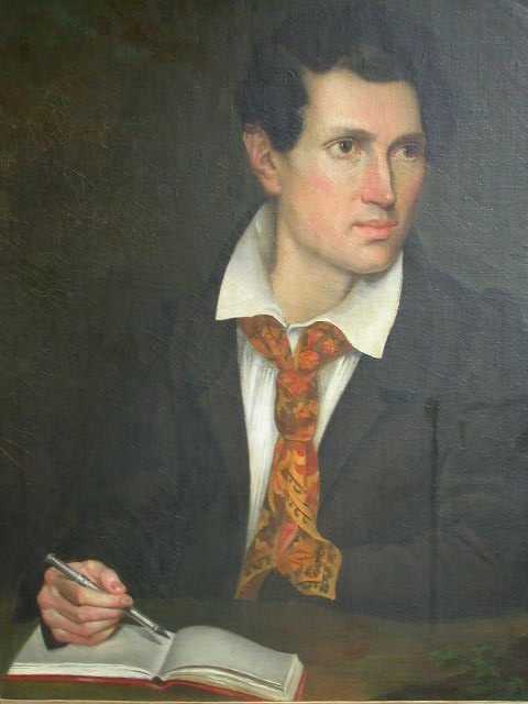 Self-portrait